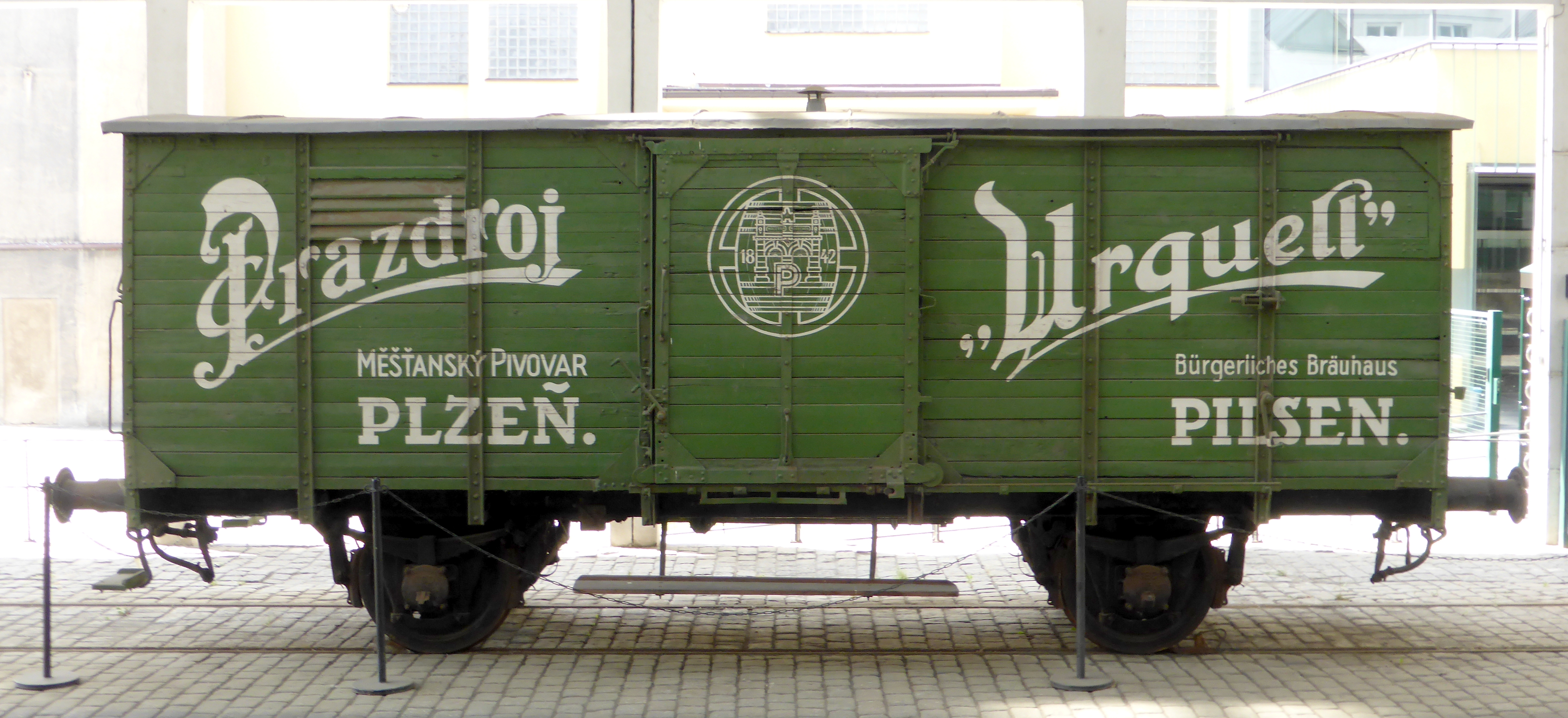 Historický nákladní vůz pivovaru Prazdroj v Plzni.